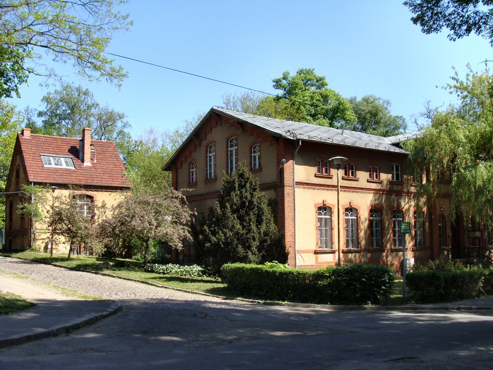 Szczecin ul. Doktora Judyma - dawny zakład opiekuńczy Kuckenmuhle